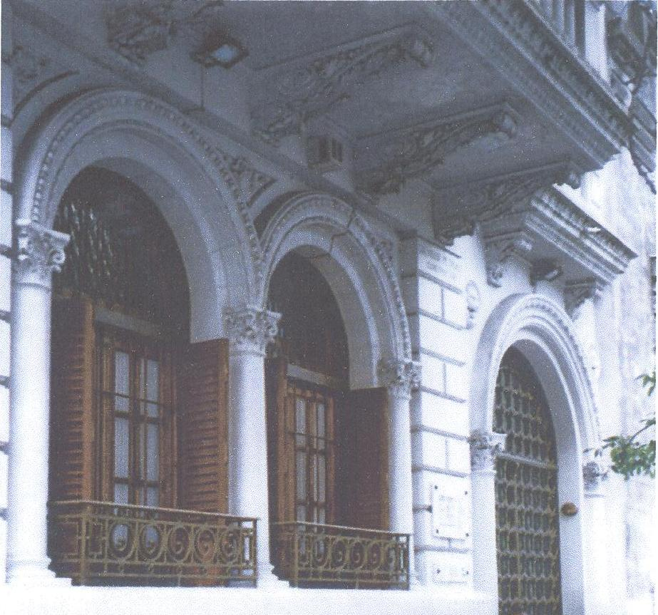 Frente actual -parcial- de calle Rioja 2234 (Rosario), casa diseñada por el Arq. para familiares Lo Celso